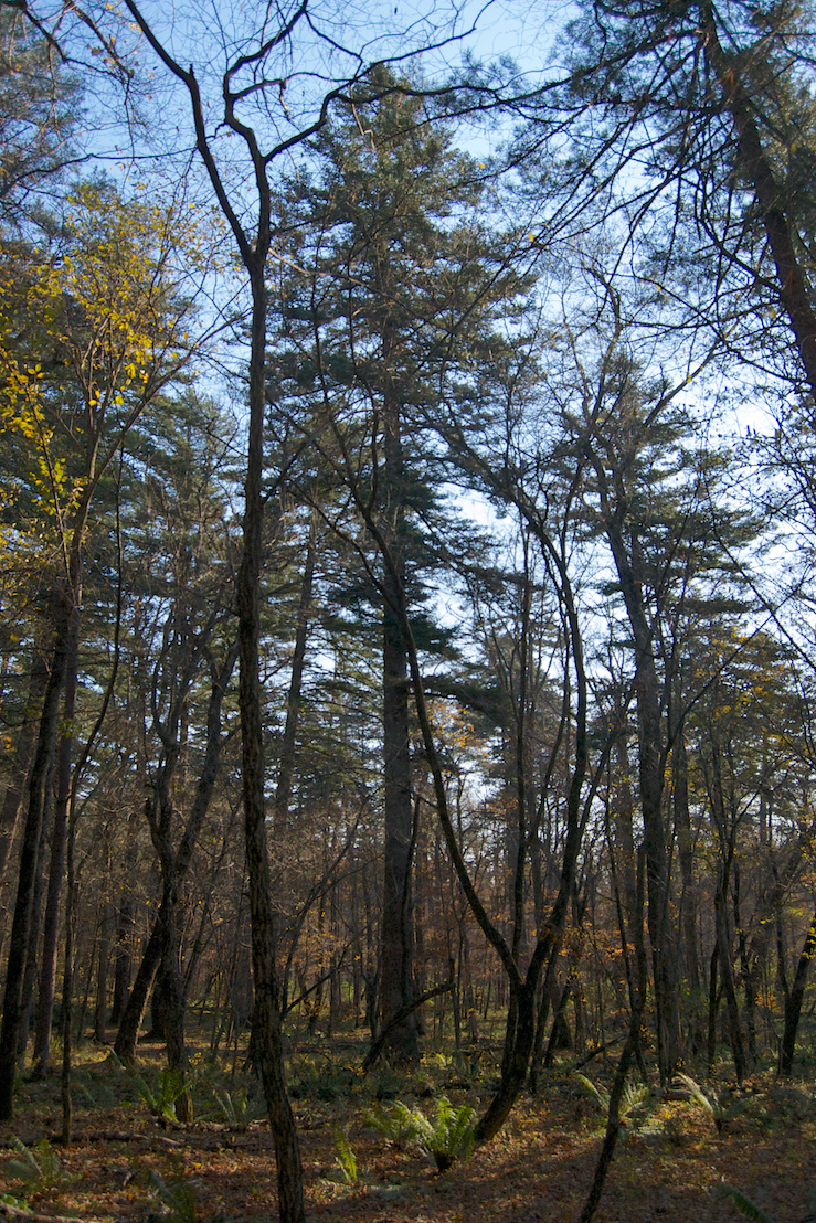 Кедровая Падь, государственный природный, Хасанский район